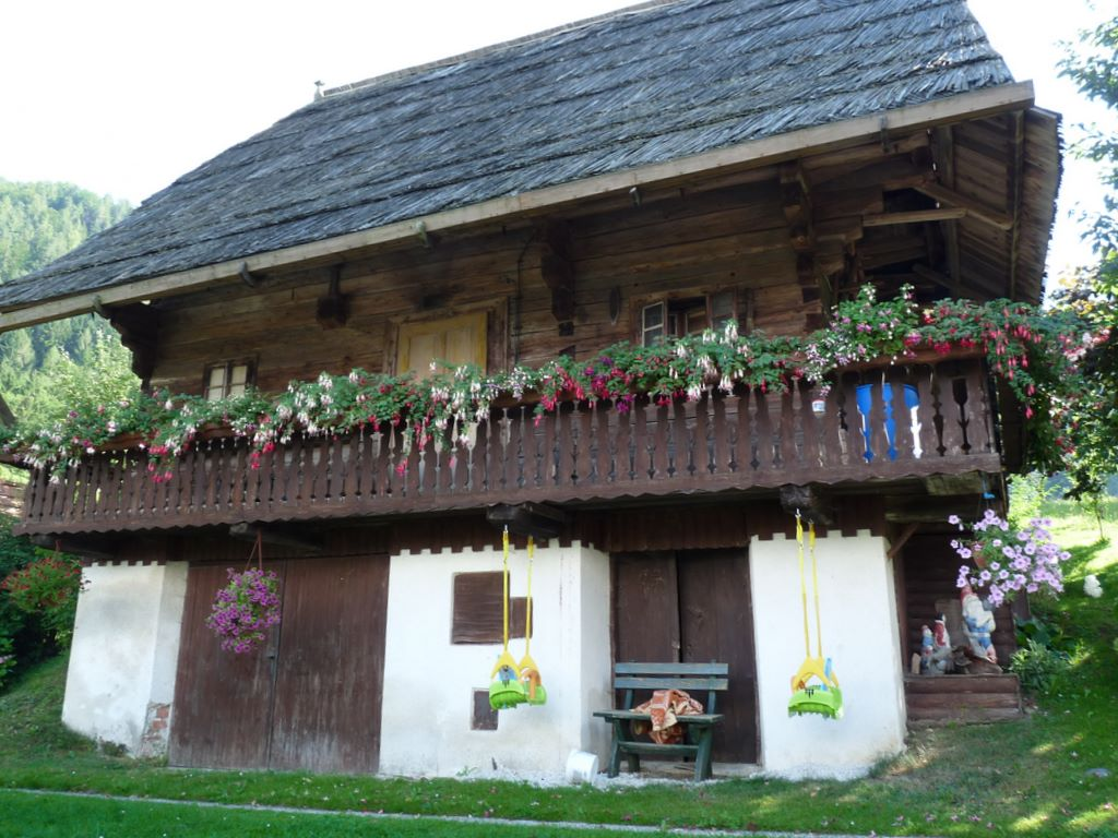 Pri Ivartniku pod Uršljo goro (Bunk iz Prežihove Jamnice) (